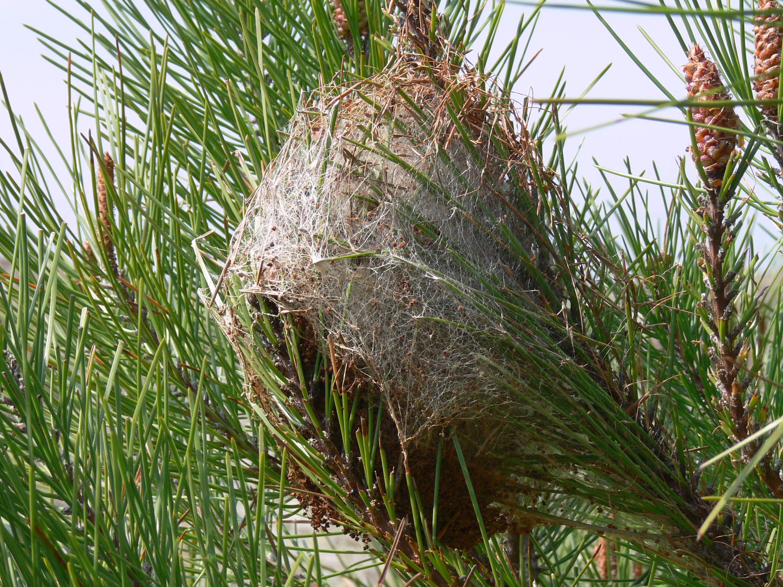 Nid de chenille processionnaire du pin (Thaumetopoea pityocampa). Photographie prise sous les pins en bordure d'un étang en France, en Bretagne, sur les rivages du golfe du Morbihan le 17 avril 2006 par F. Lamiot.